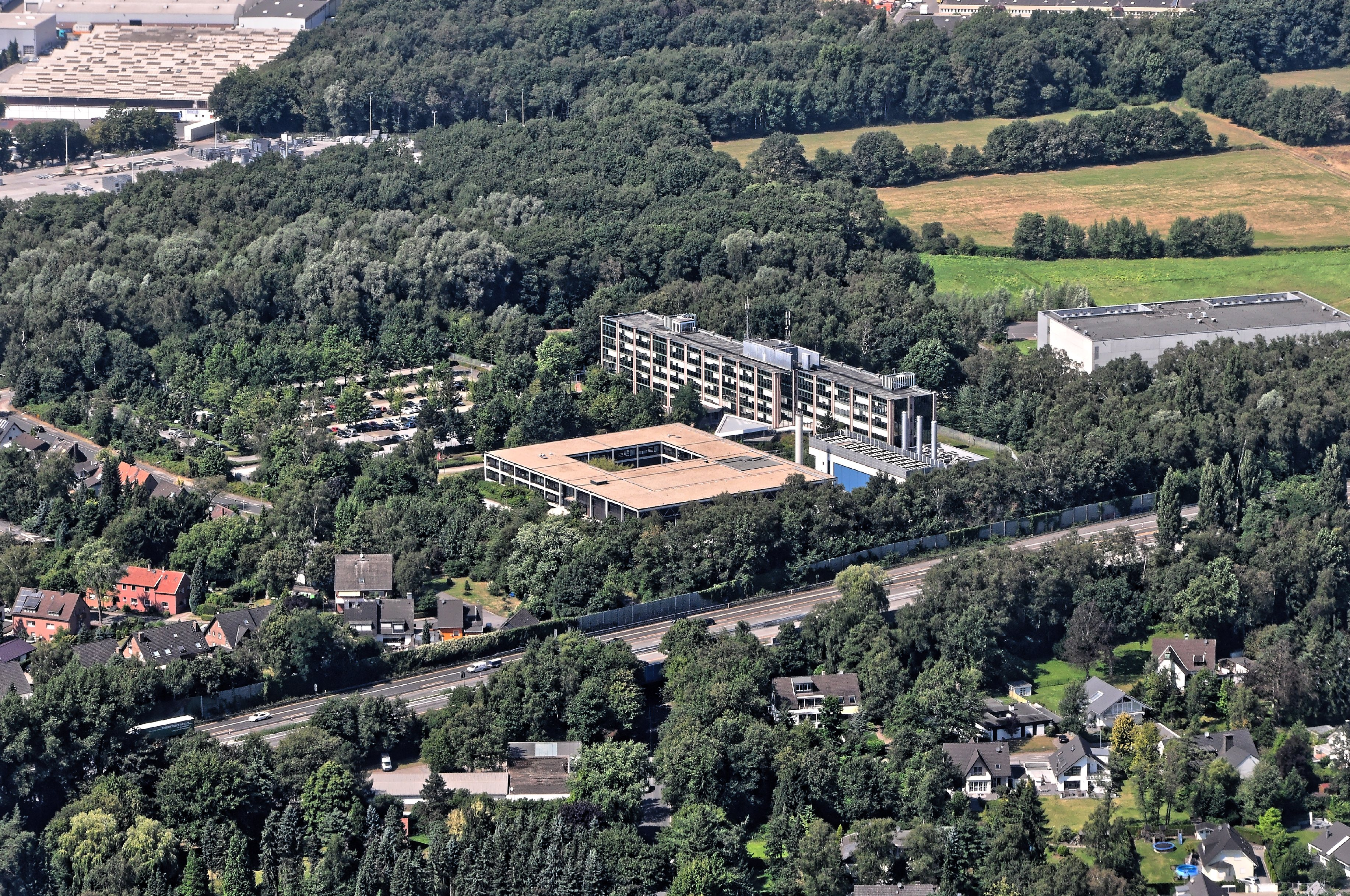 Bilder vom Flug -Rom-Düsseldorf-Hamburg 2013 Dieses Foto entstand in Zusammenarbeit mit Stadtbesichtigungen.de Die Seiten Stadtbesichtigungen.de, der dazugehörige Reise Blog sowie die Facebookseite: Stadtbesichtigungen Rom dürfen dieses Bild für Ihre Veröffentlichungen ohne den Hinweis auf Wikipedia, Commons bzw der Lizenz verwenden. Die Verantwortlichen habe von mir (Ra Boe) die Originaldaten zur freien Verfügung übermittelt bekommen.